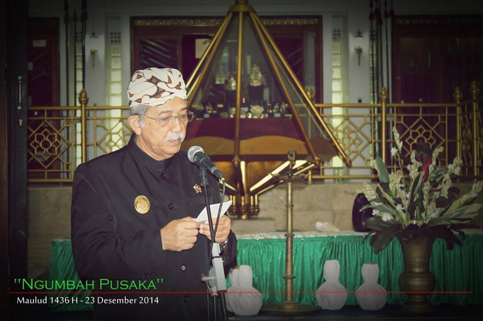 Binokasih